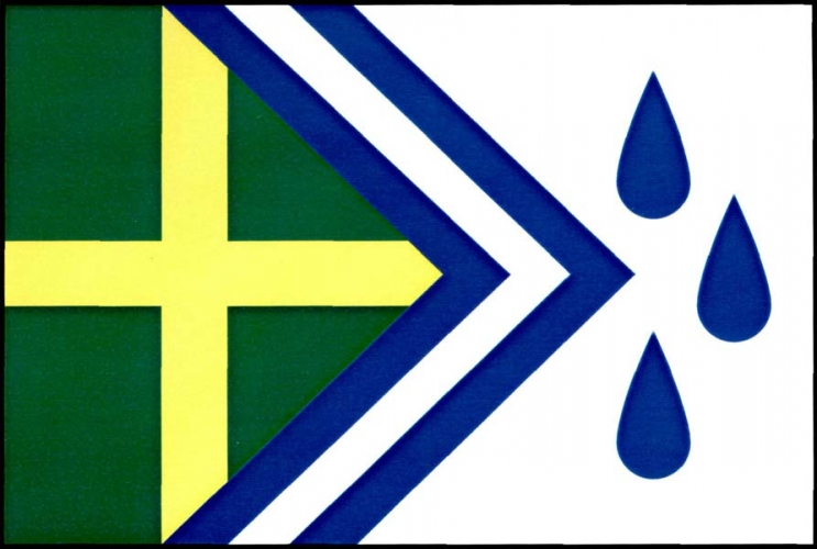 Vlajka, Široký Důl, okres Svitavy